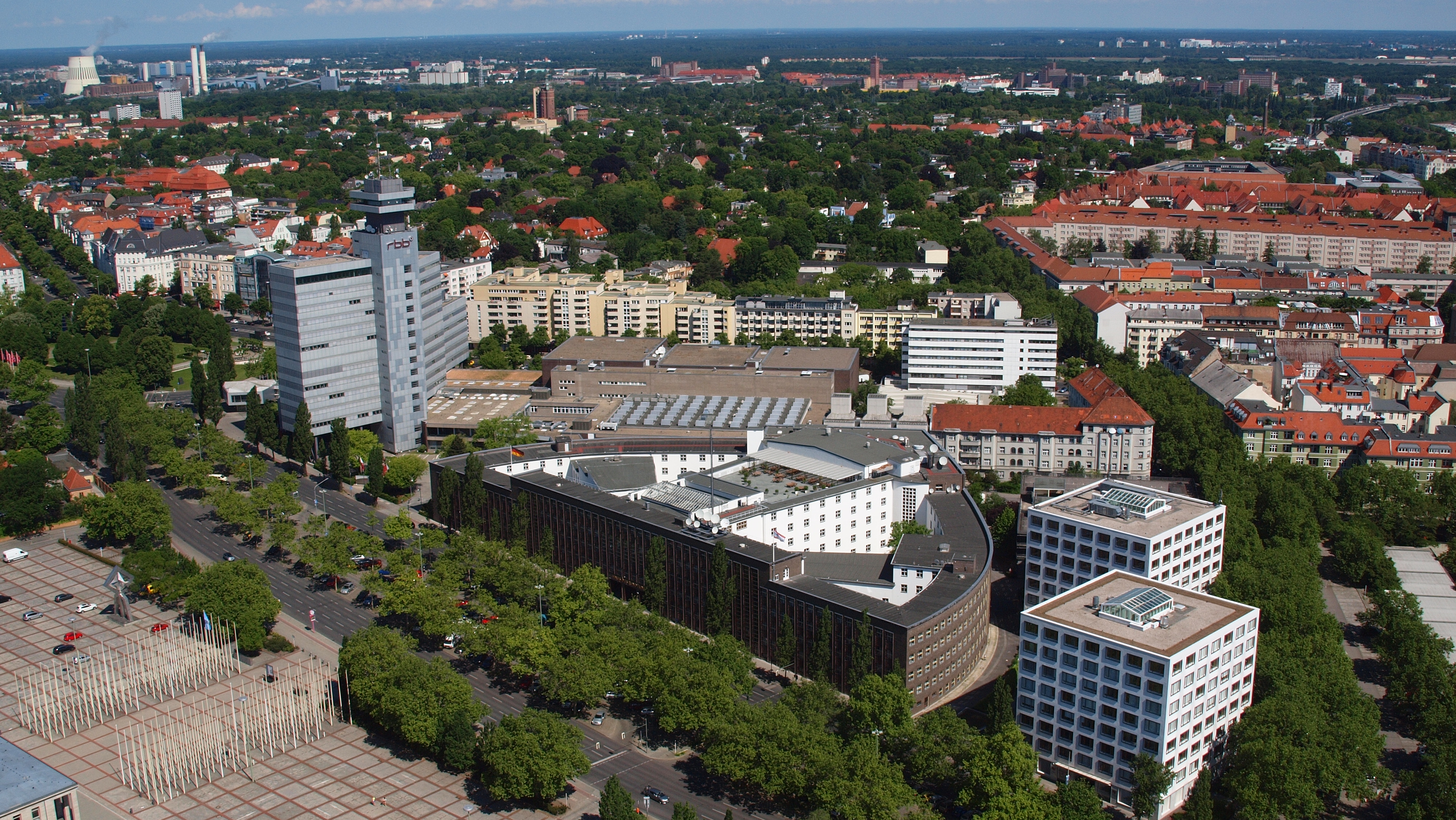 Berlin, Haus des Rundfunks, Fernsehzentrum